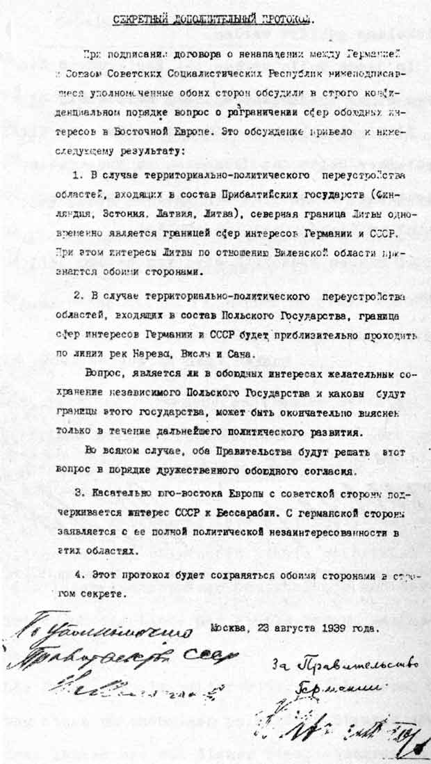 Секретный дополнительный протокол к Договору о ненападении между СССР Германией от 23 августа 1939